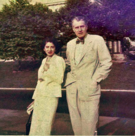 1954 La escritora salvadoreña Dora Guerra participa en la II Bienal Internacional de Poesía, en Bélgica